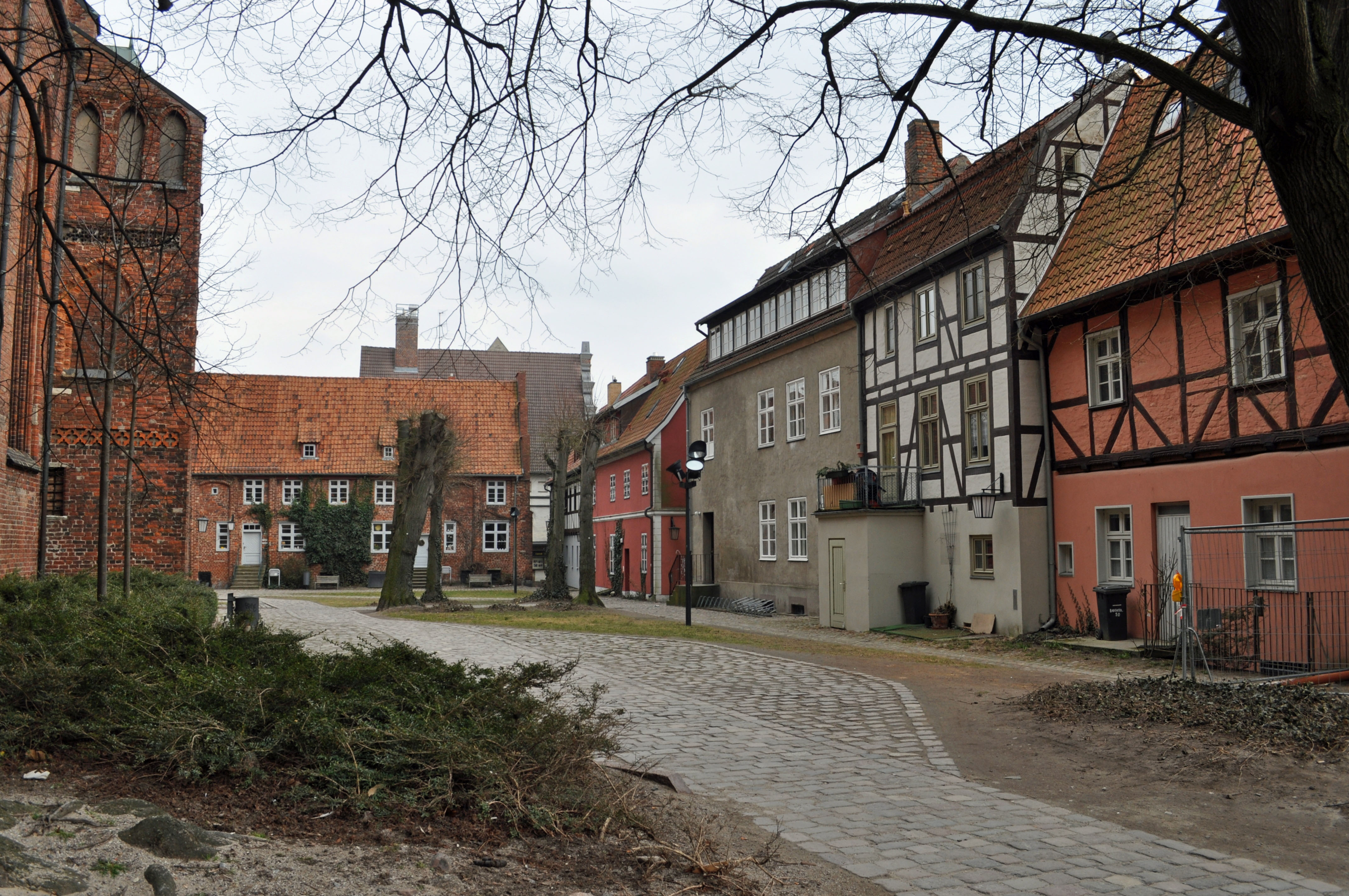 Gebäude bzw. Gebäudedetail in Stralsund. Straße und Hausnummer siehe Dateiname.